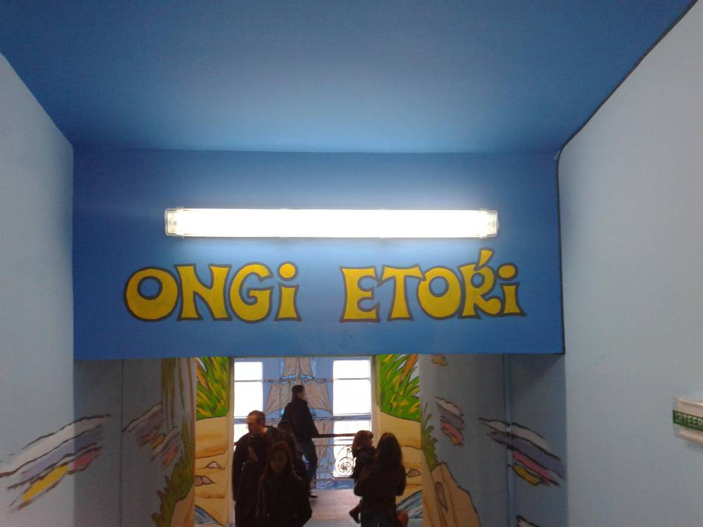 Igeldoko jolas-parkea. RR bikoitz sabindarraren Ŕ hizkiaren agerpen bat 21. mendean